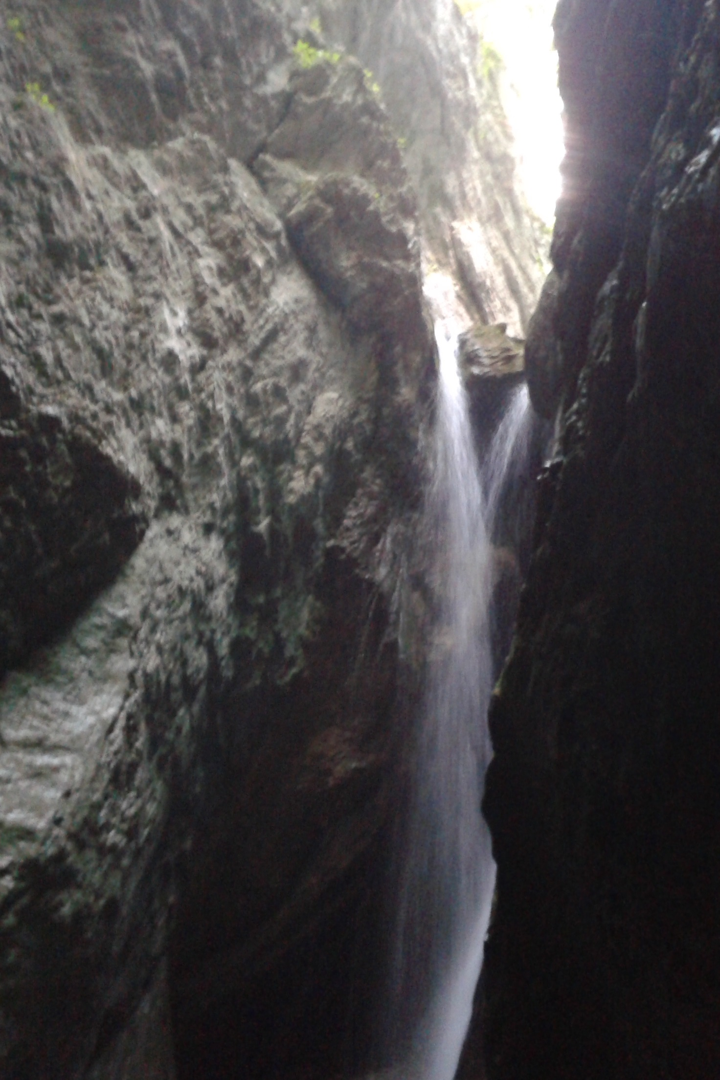 Cascata nella Gola dei Tre Salti (Tre Santi), torrente Tennacola, Monti Sibillini